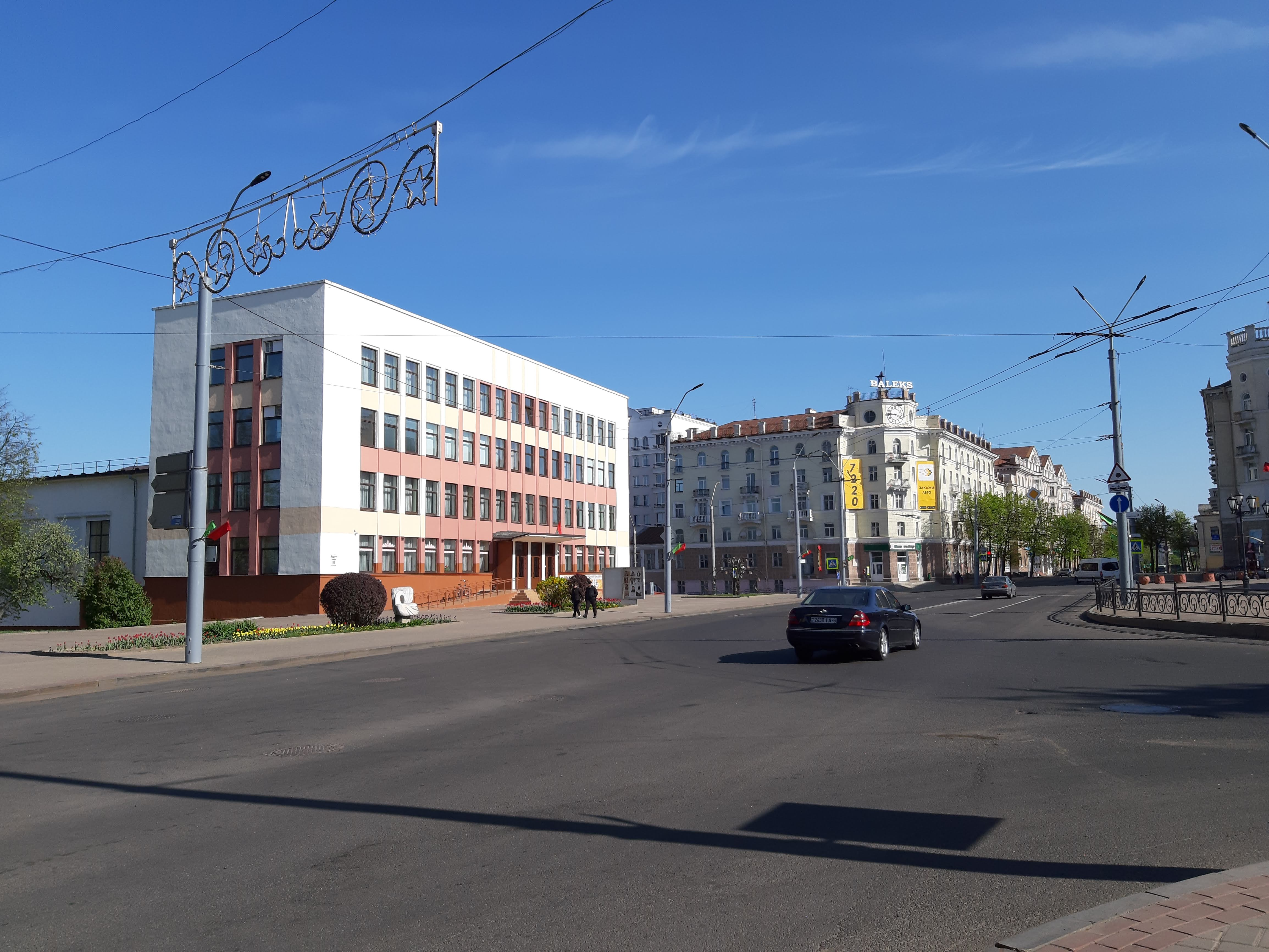 Магілёў у 2019 г.